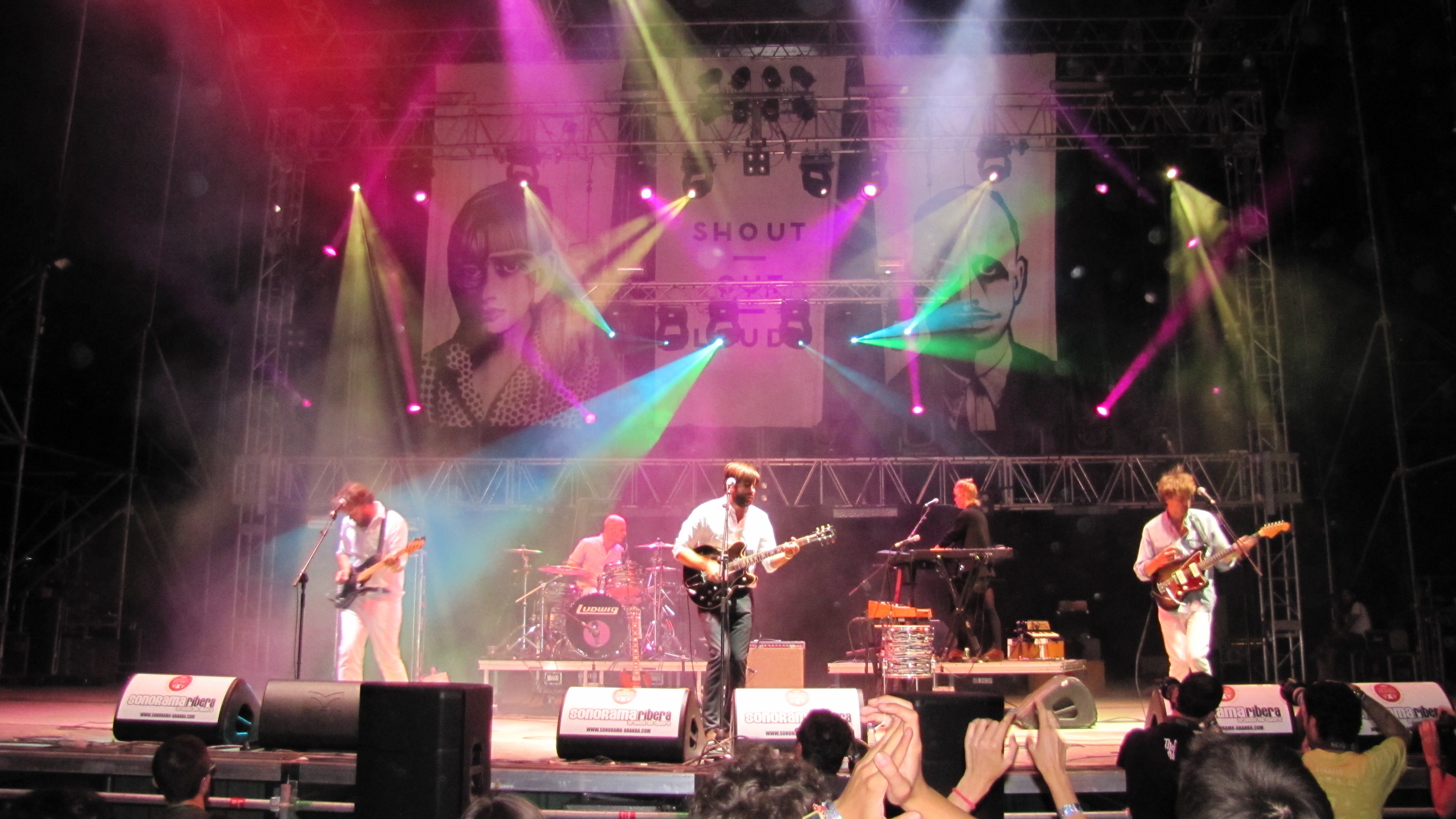 Concierto de Shout Out Louds durante el Festival Sonorama Ribera 2011 (Aranda de Duero, Burgos, España)